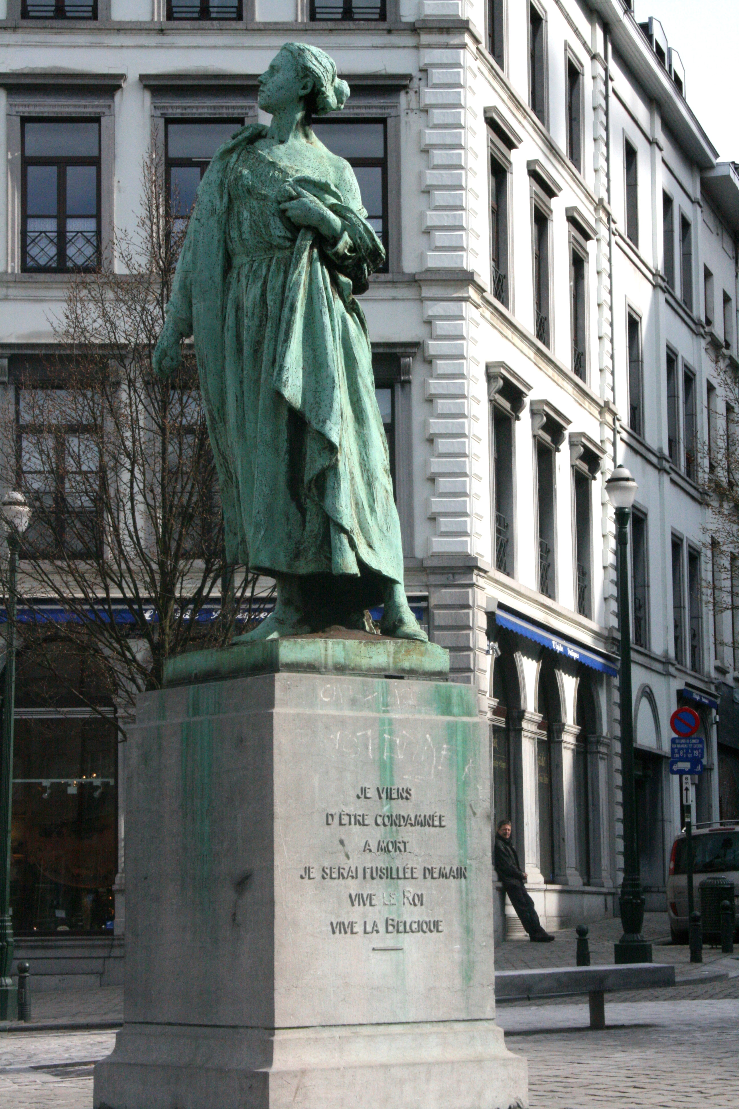 Statue de Gabrielle Petit, place Saint-Jean à Bruxelles (Belgique)